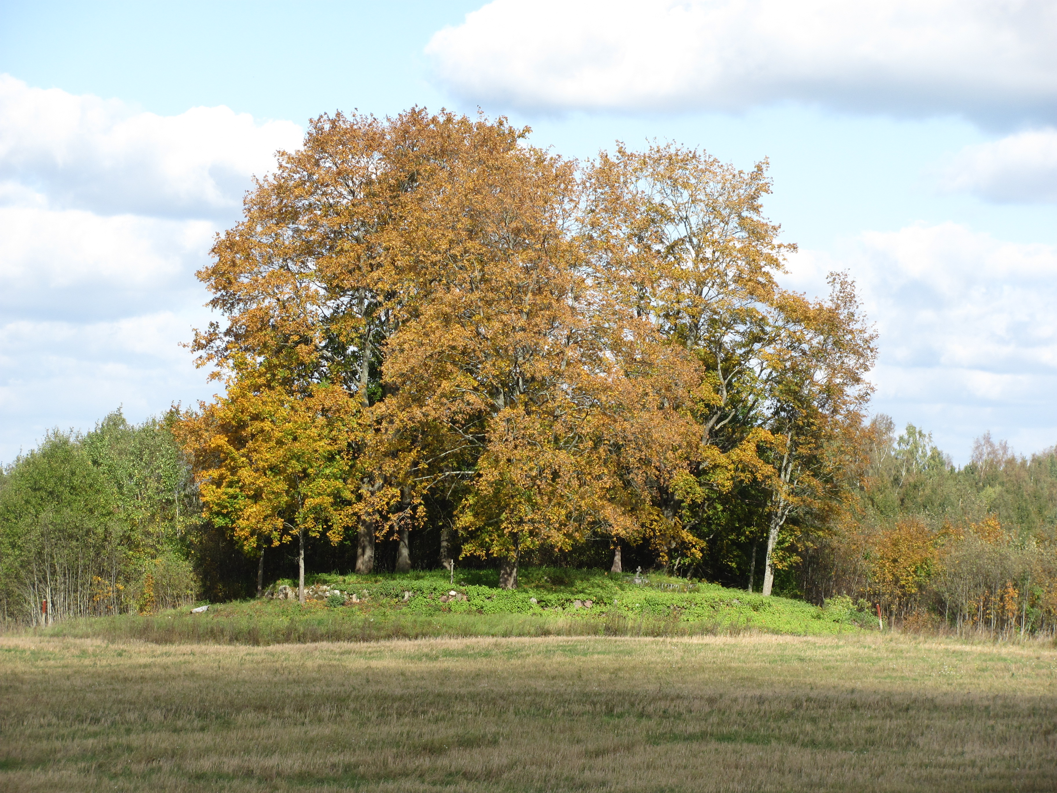 Zarinkiškiai 42207, Lithuania